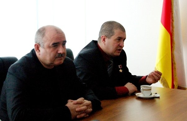 Ambasadoro de Suda Osetio Dmitrij Medojev (maldekstra) kun Heroo de Rusio Sergej Kobilaŝ. Moskvo, 2010.